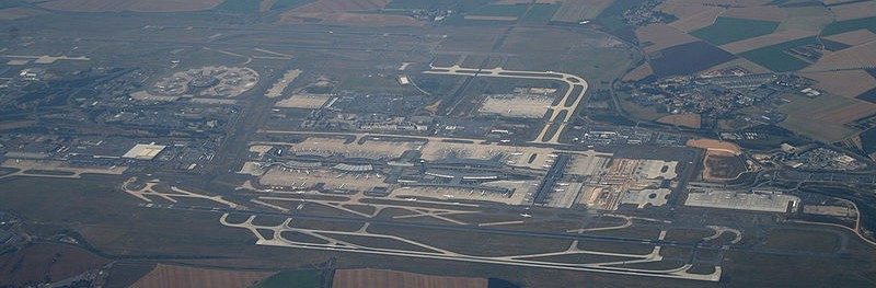 Vue panoramique de Roissy-Charles De Gaulle